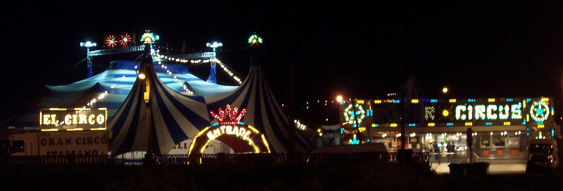 Circo en Gijón, Asturias, España. Fecha: 08 de Octubre de 2005. Circus in Gijón, Asturias, Spain. Date: 08 Octobre 2005. Author: Roberto Sueiras